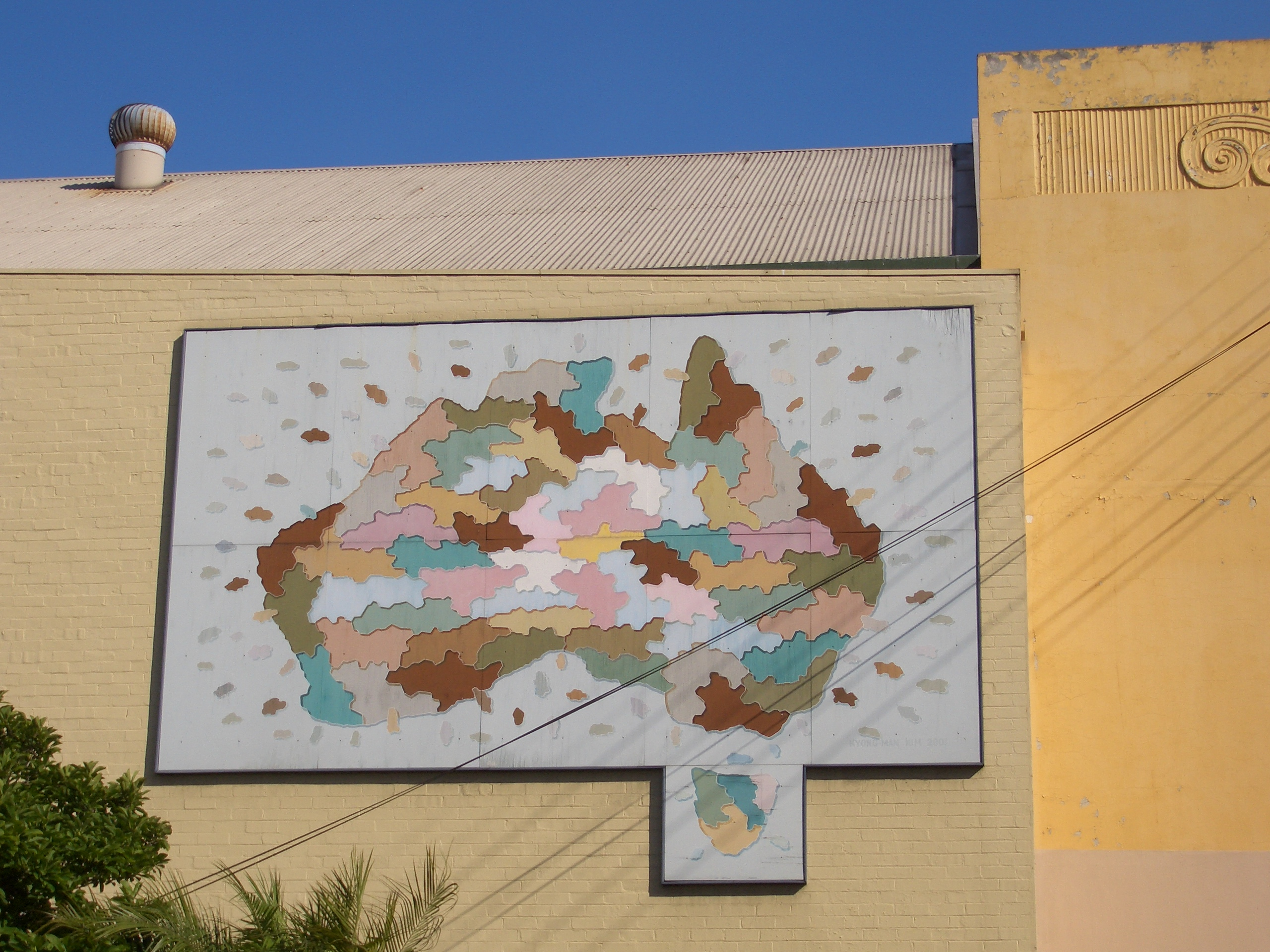 Campsie